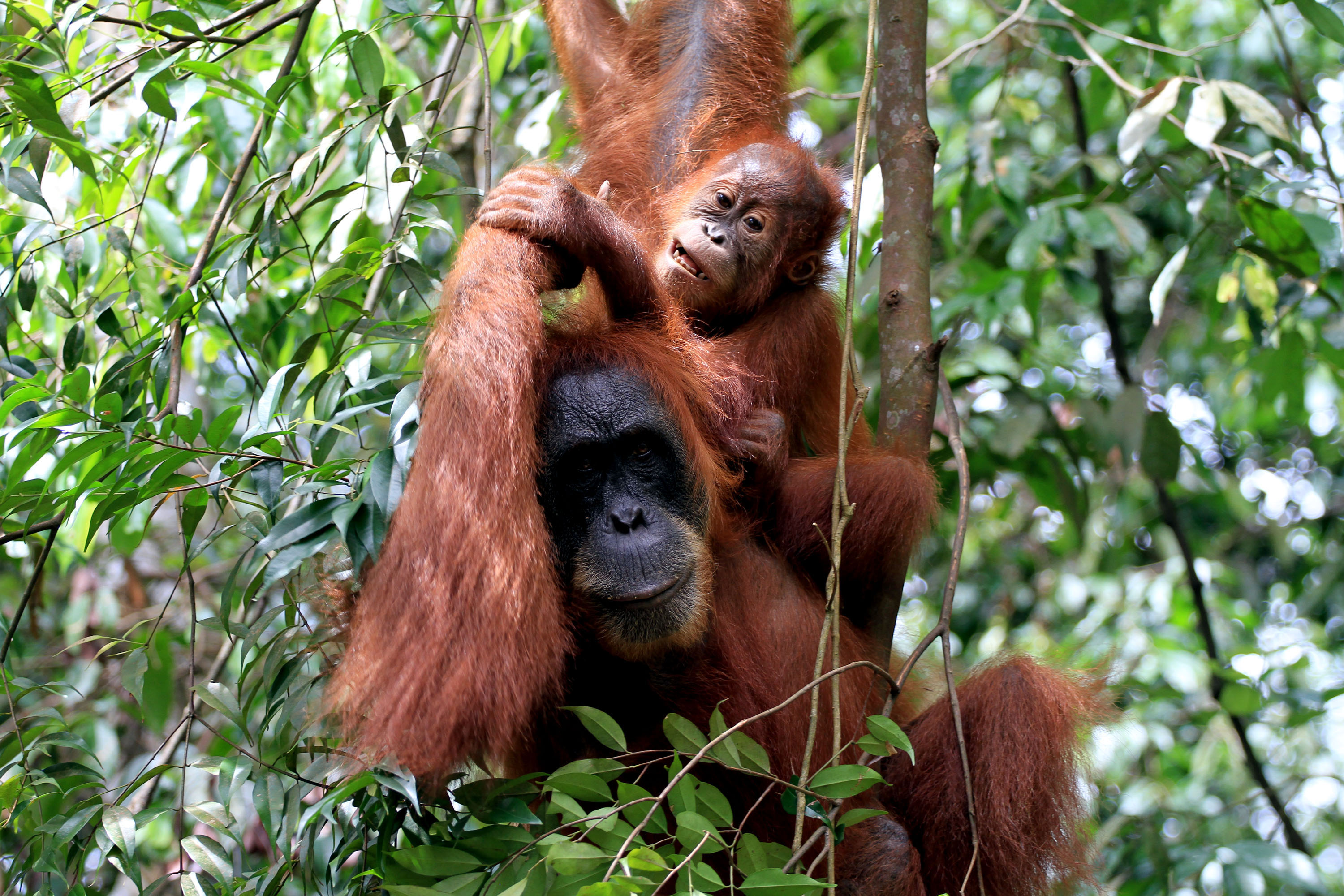 Dua individu Orangutan Sumatera bercengkrama di Taman Nasional Gunung Leuser, Kabupaten Langkat, Provinsi Sumatera Utara sekitar November 2015